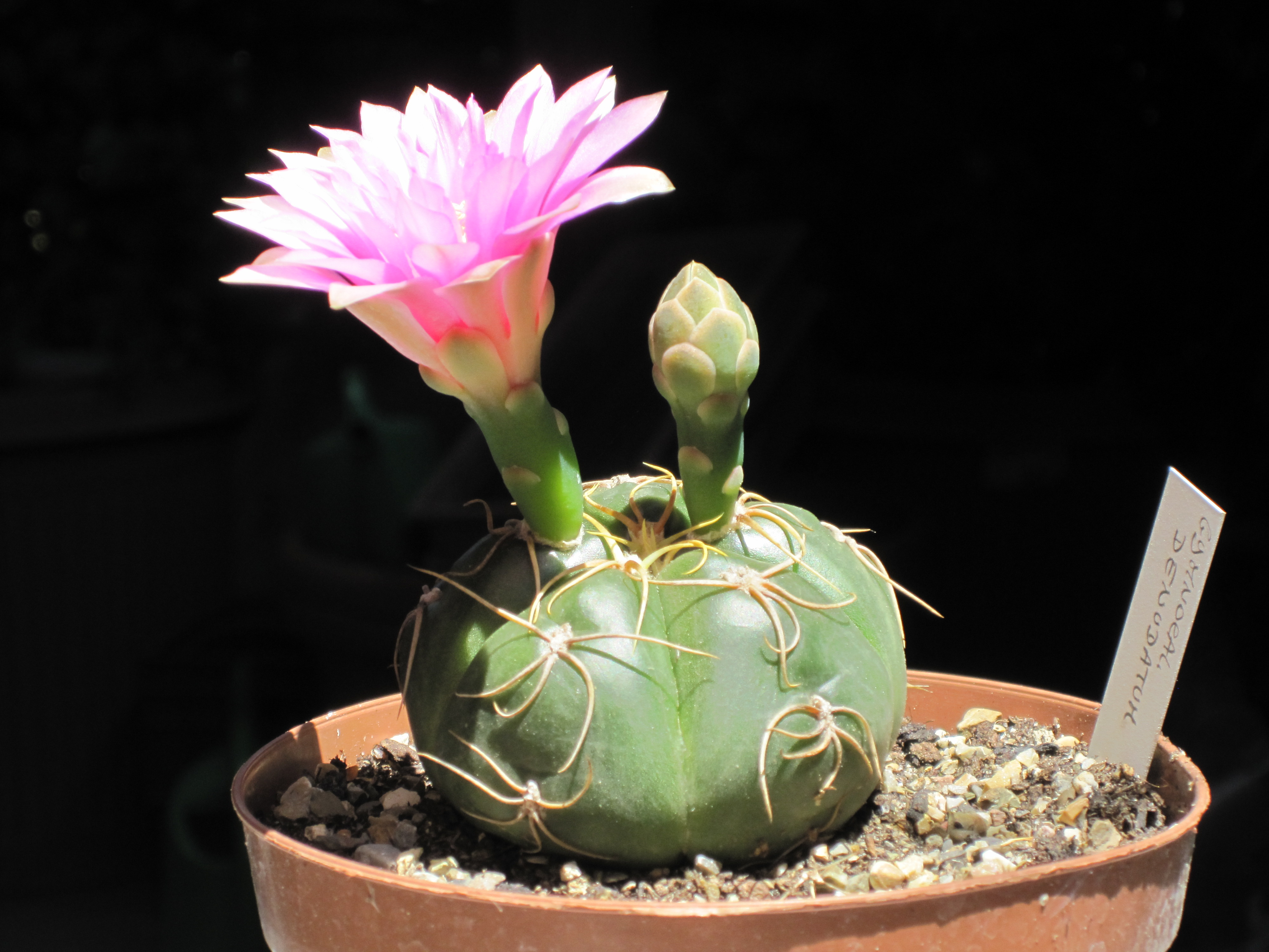 Gymnocalycium denudatum in fiore